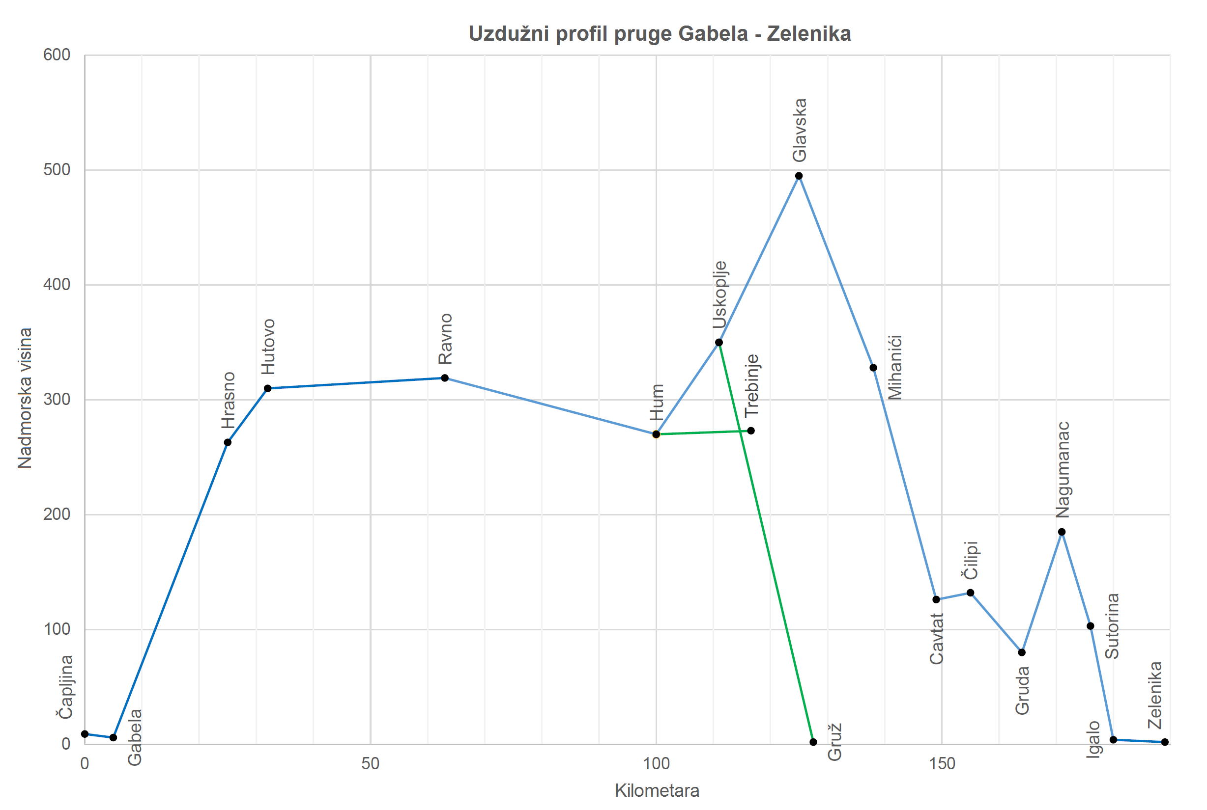 Uzdužni profil pruge Gabela - Zelenika